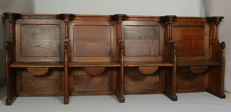 Il s'agit de stalles à miséricordes (saillies fixées sous les abattants mobiles des stalles). Elles sont ornées d'un décor sculpté végétal peu abondant qui occupe les chapiteaux des colonnettes, les miséricordes et l'extrémité des accotoirs. Les miséricordes (saillies fixées sous les abattants des stalles) permettaient aux chanoines de s'appuyer ou de s'asseoir pendant les offices.